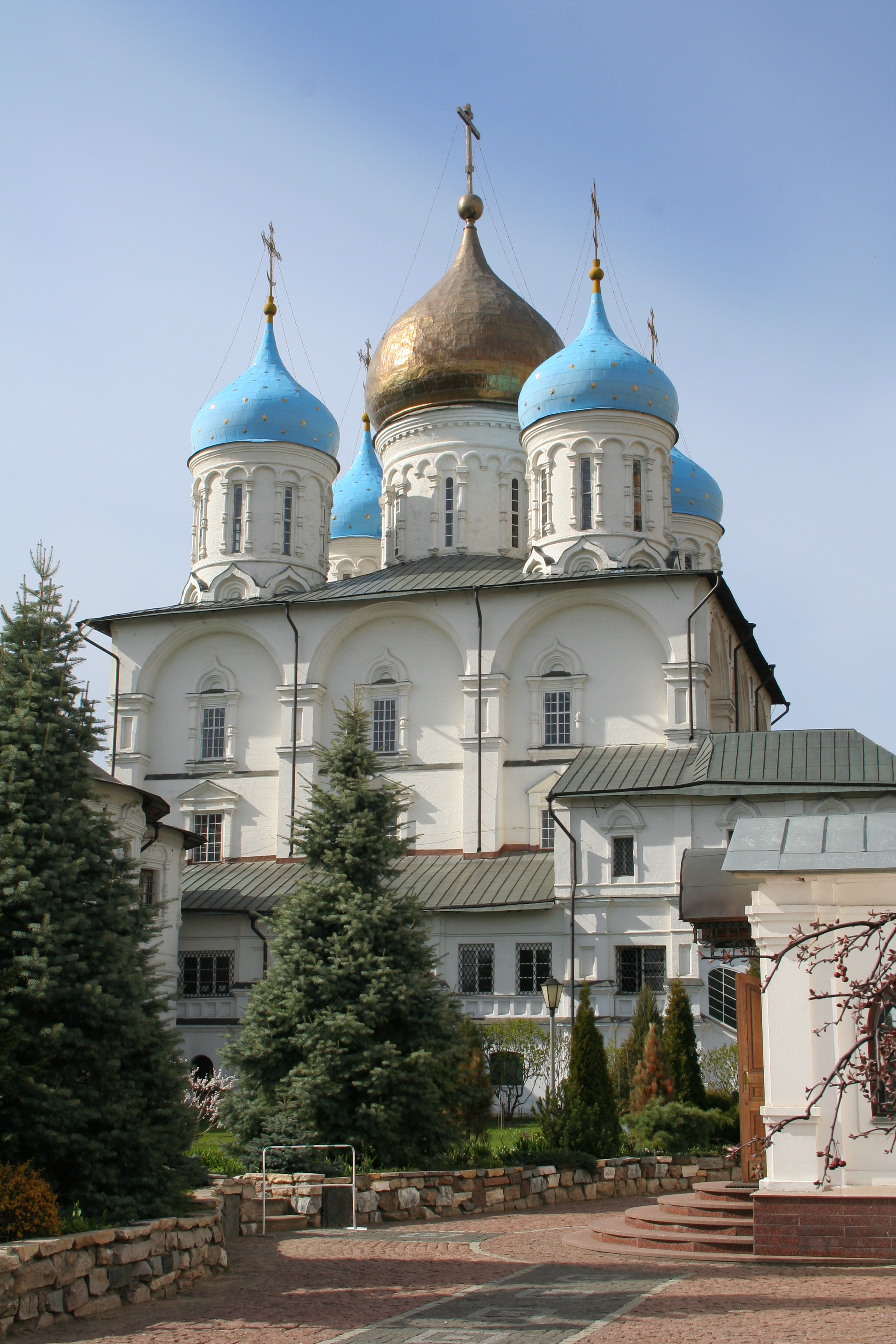 Erlöser-Verklärungs-Kathedrale des Neuen Erlöserklosters in Moskau